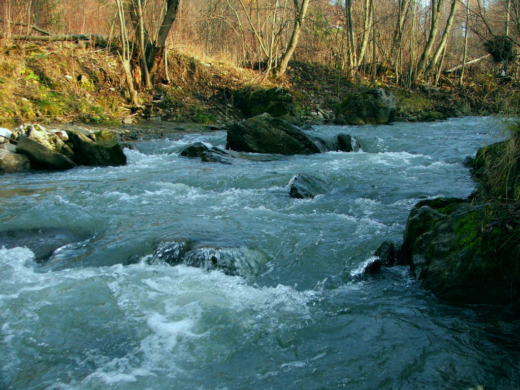 Grajcarek (Małe Pieniny